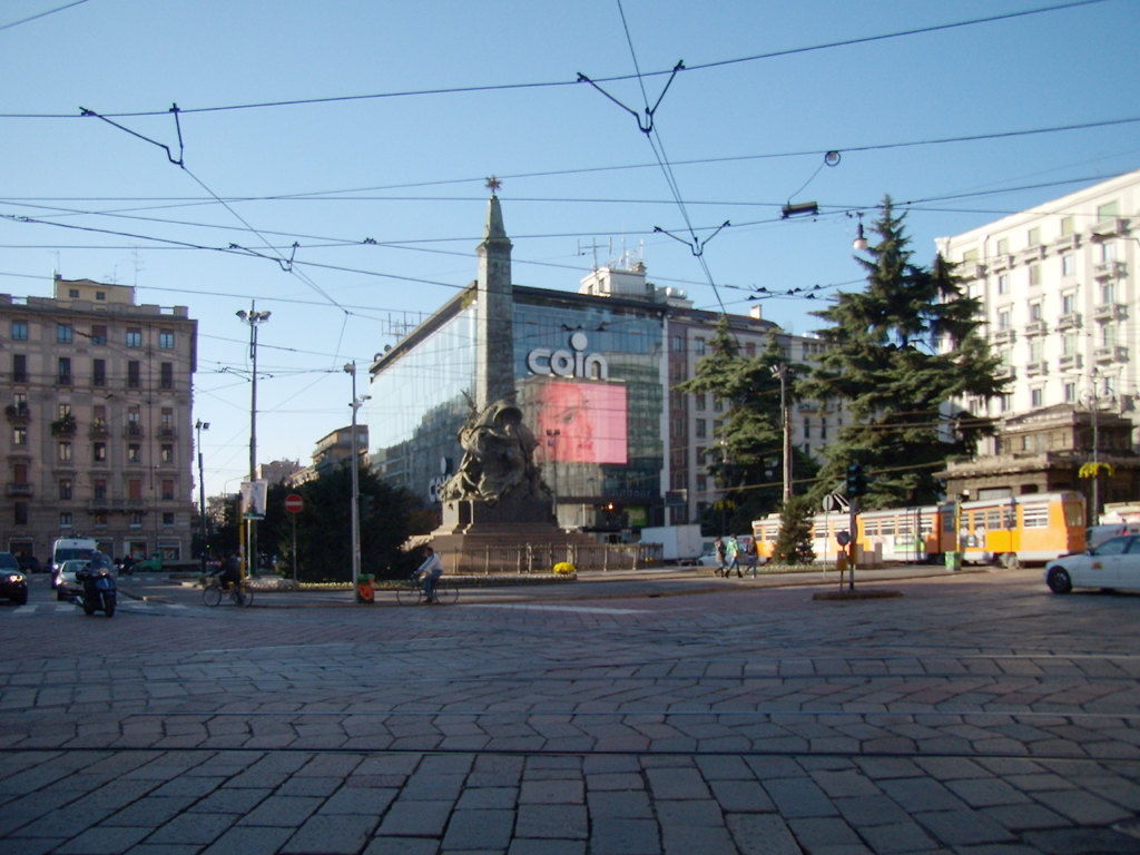 Vista di piazza V Giornate a Milano